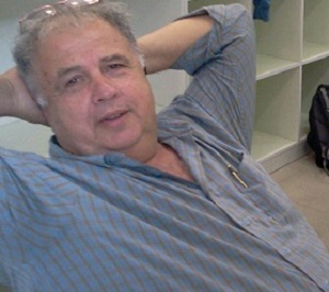 חנן בתנוחה נינוחה